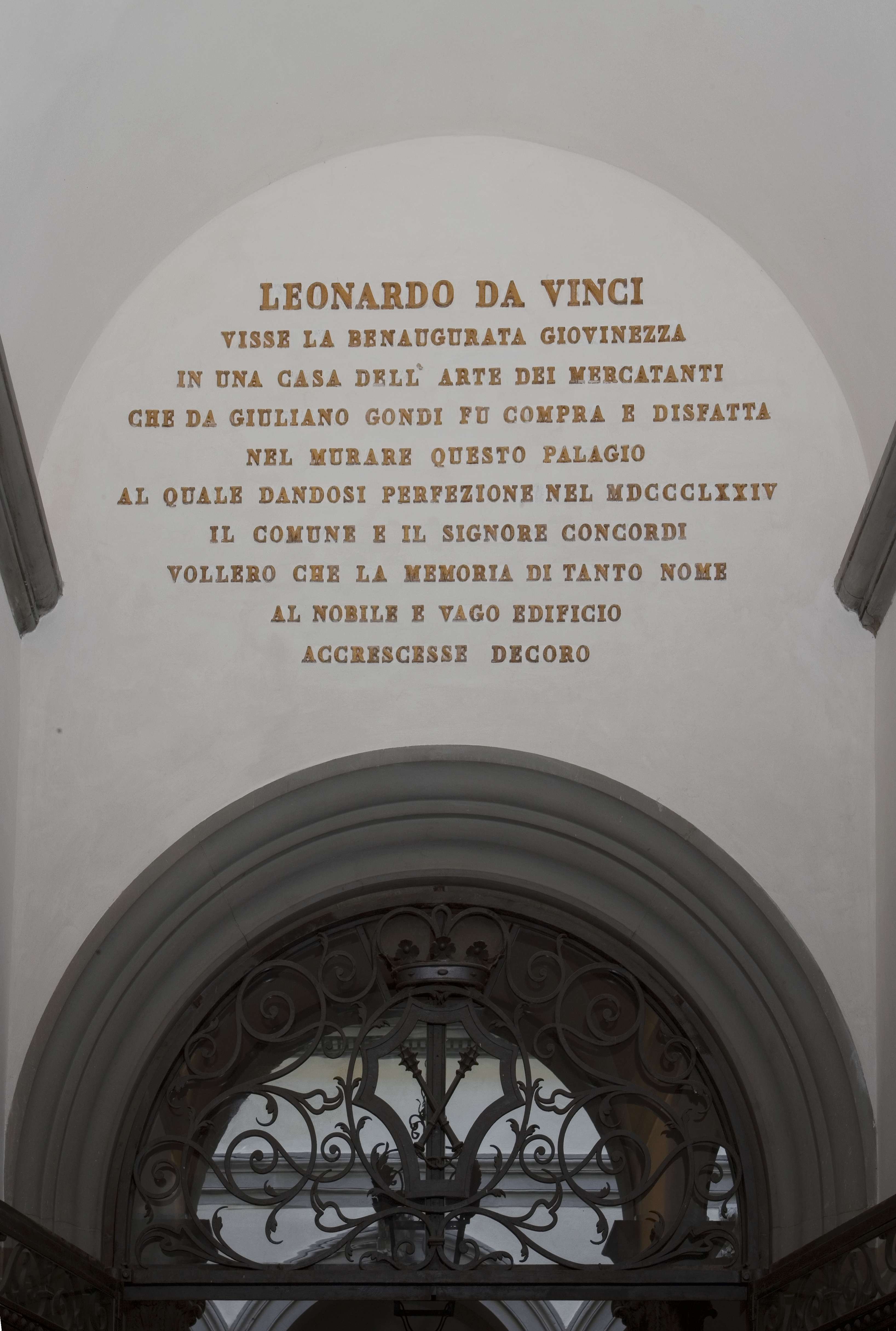 palazzo Gondi, androne, inscrizione